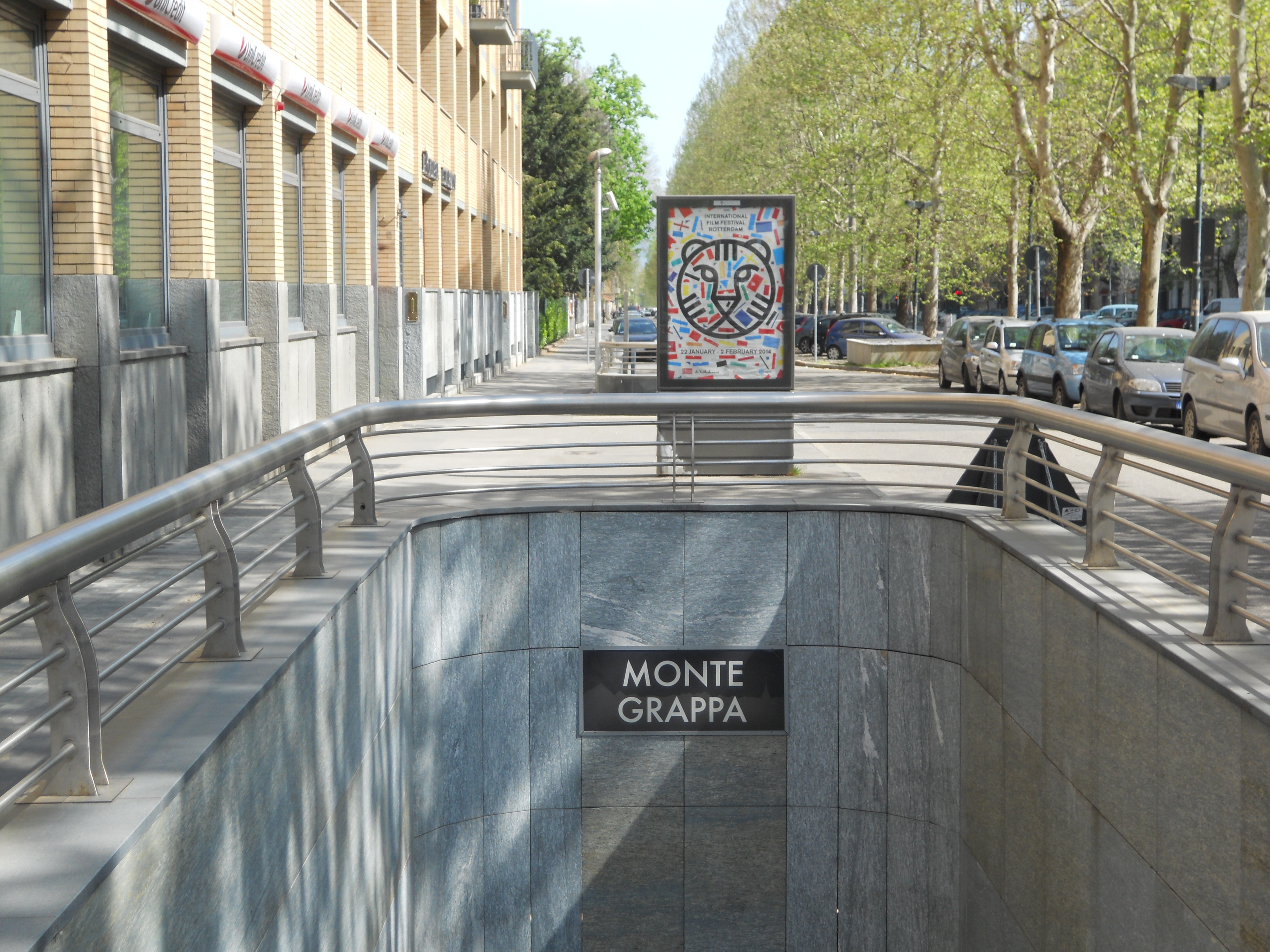 Ingresso al Metro Monte Grappa